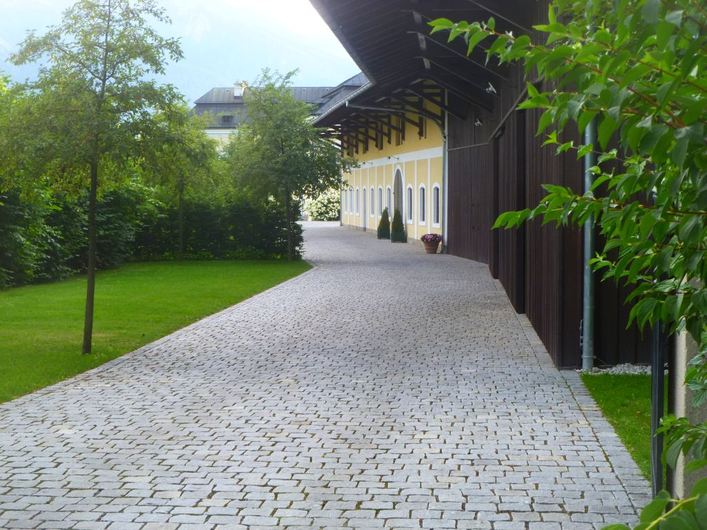 Schloss Montfort (Salzburg) Wirtschaftstrakt